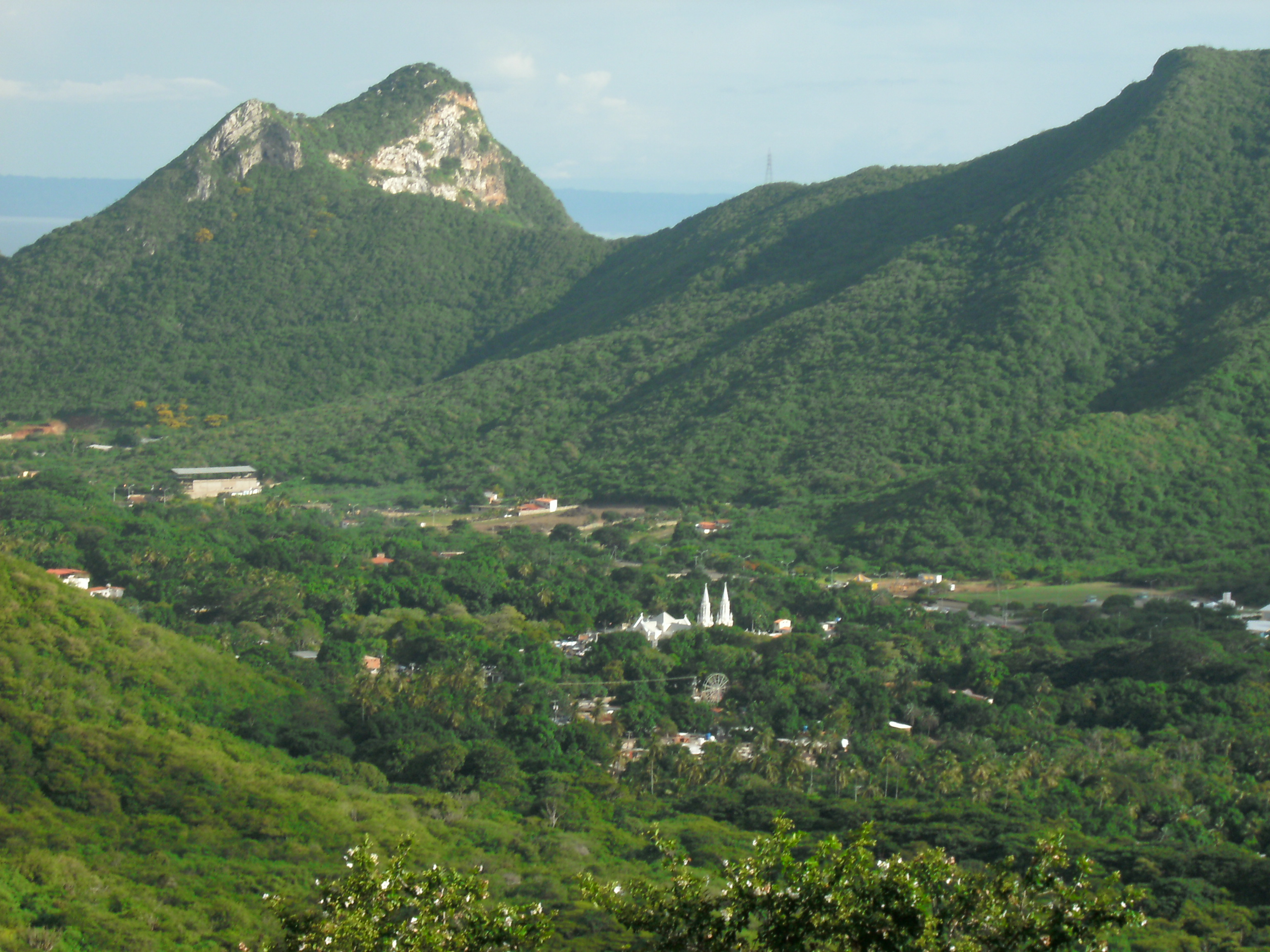 Vista al Valle del Espiritu Santo